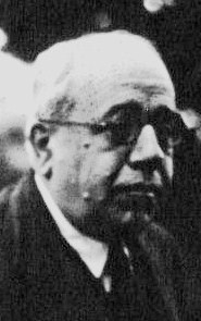 Manuel Azaña, presidente de España (1936 - 1939).